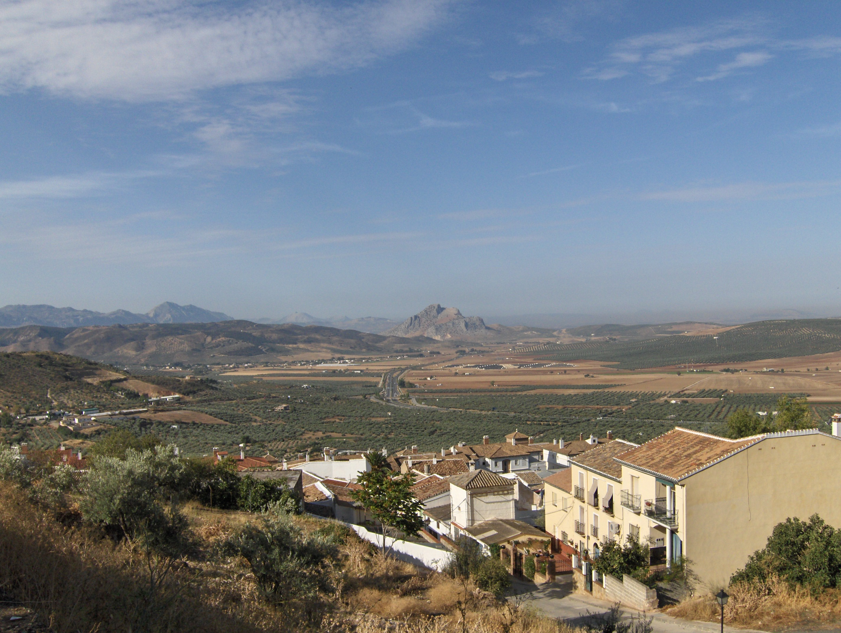 Vega de Archidona (Málaga, España), al fondo la Peña de los Enamorados.